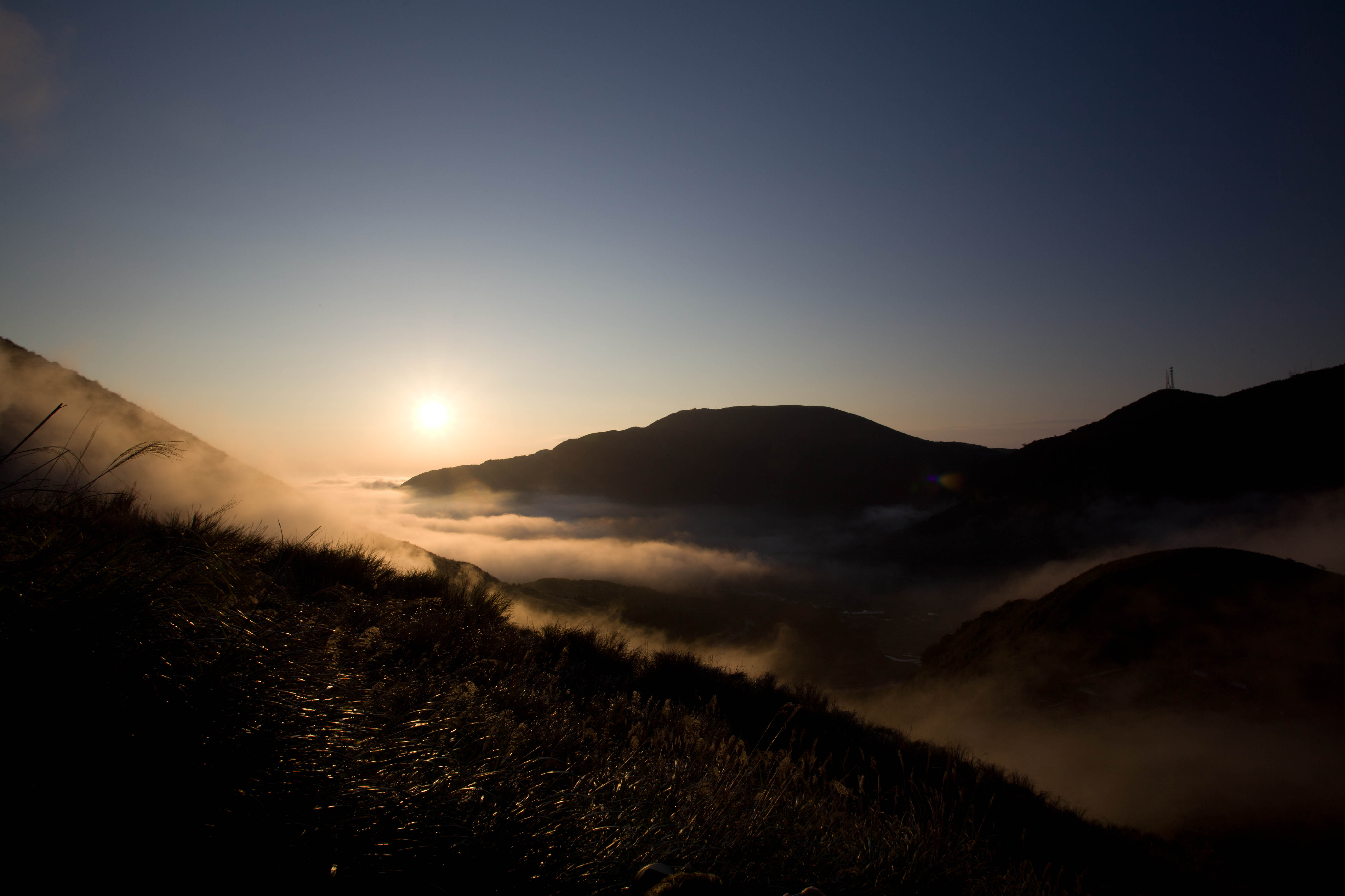 Vue du parc Yangmingshan depuis le mont Qixing